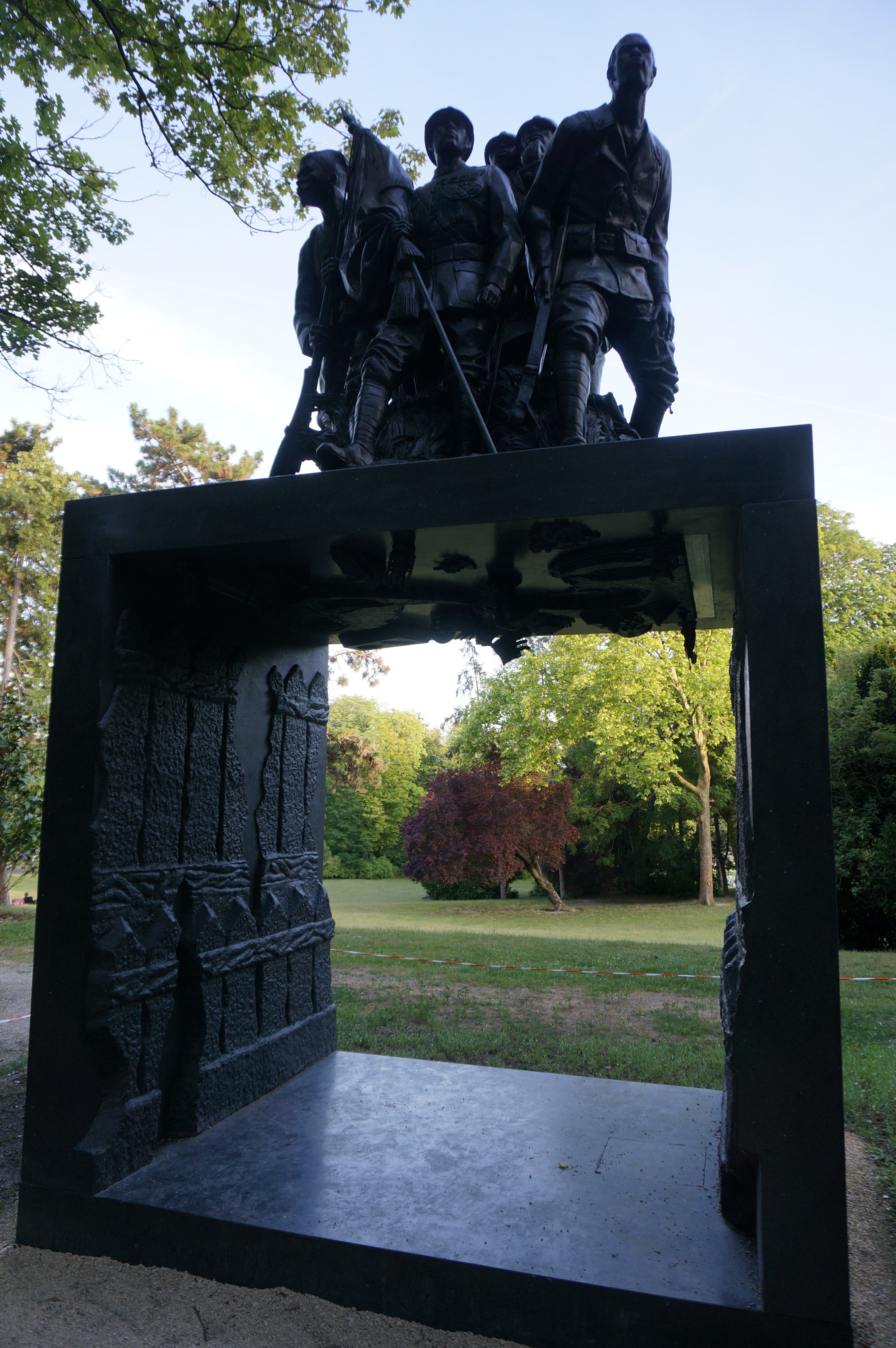 Monument à l'Armée Noire à la place de 2013.